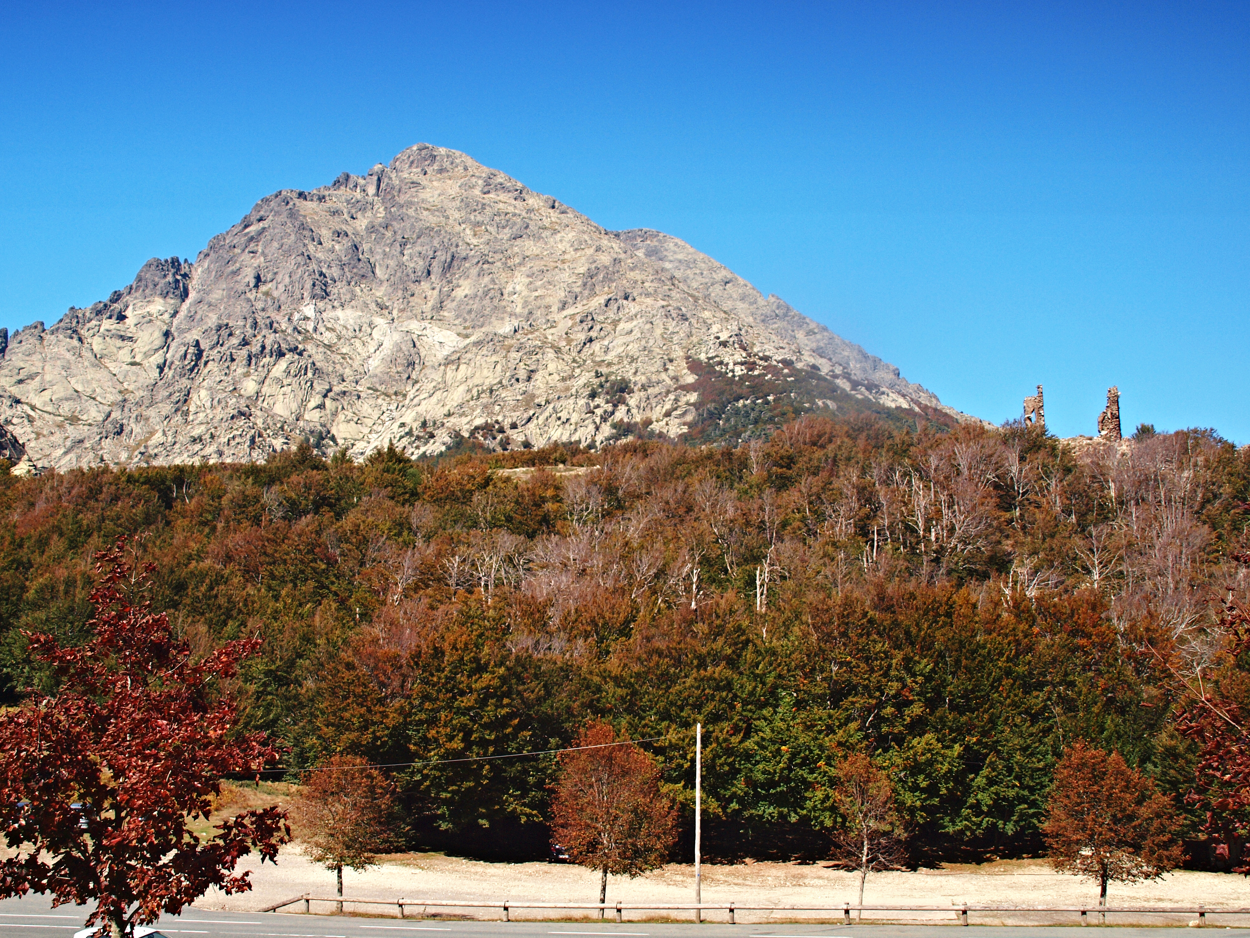 Vivario (Corsica) - Vue du Monte d'Oro et ruines du Fort de Vaux au col de Vizzavona